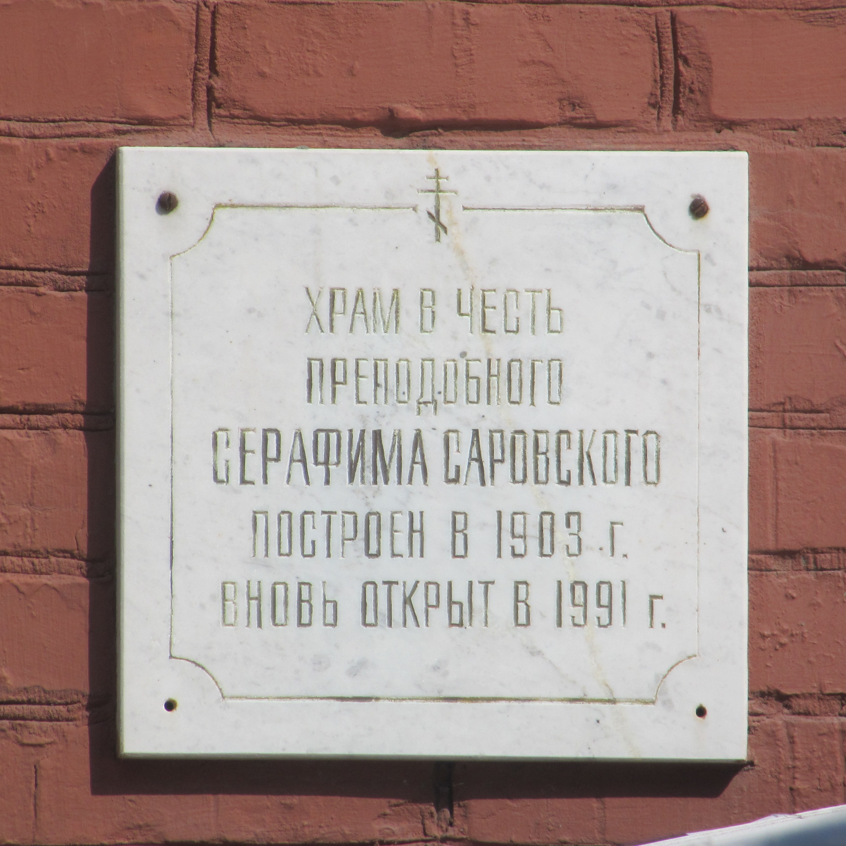 Храм в честь преподобного Серафима Саровского, ул. Университетская угол ул. Большая Горная, Саратов.